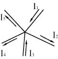 схема на електрически възел с обозначение на протичащите токове; автор Николай Димитров